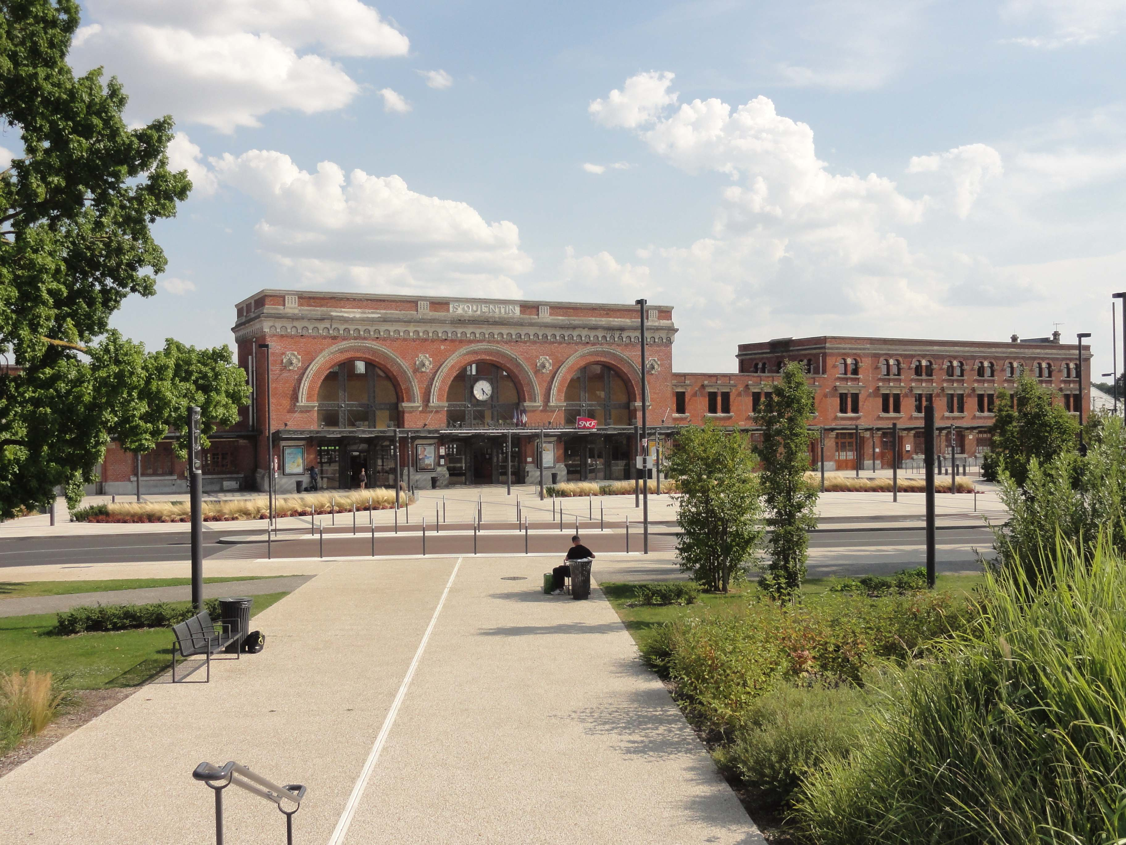 Gare de Saint-Quentin.